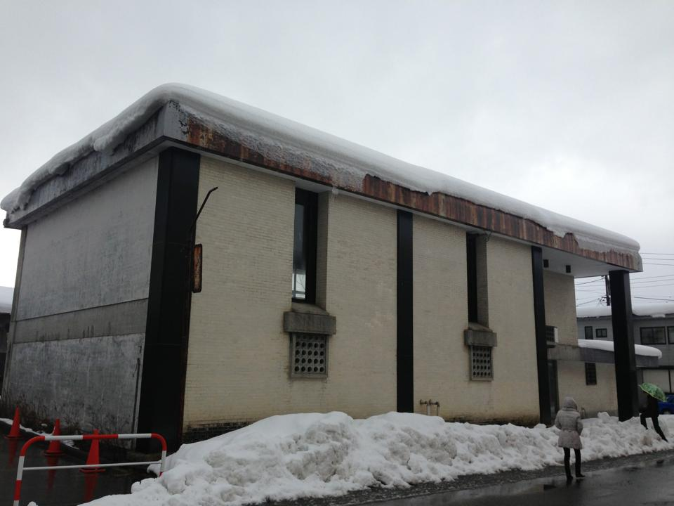 白井晟一の建築